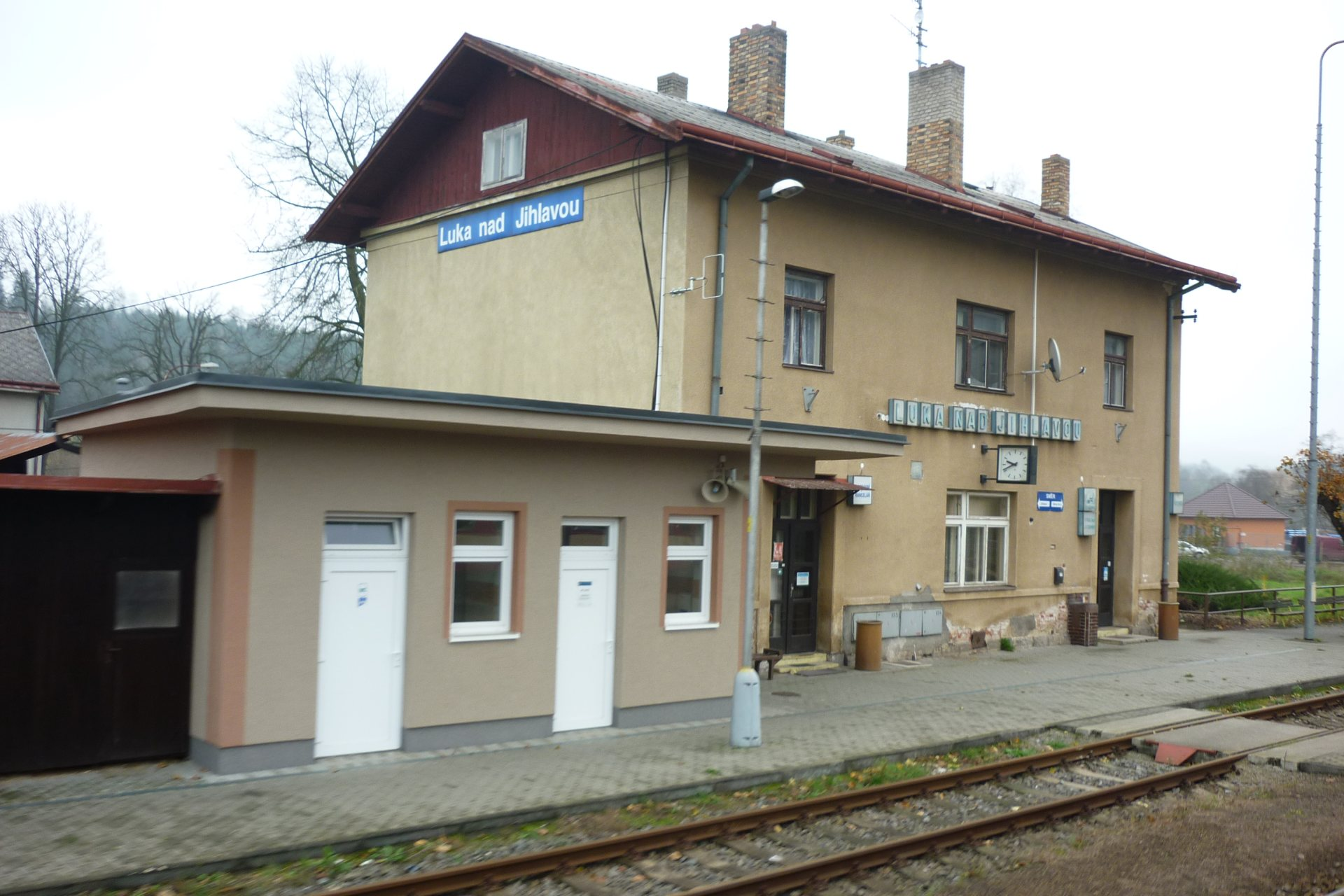 Železniční stanice Luka nad Jihlavou